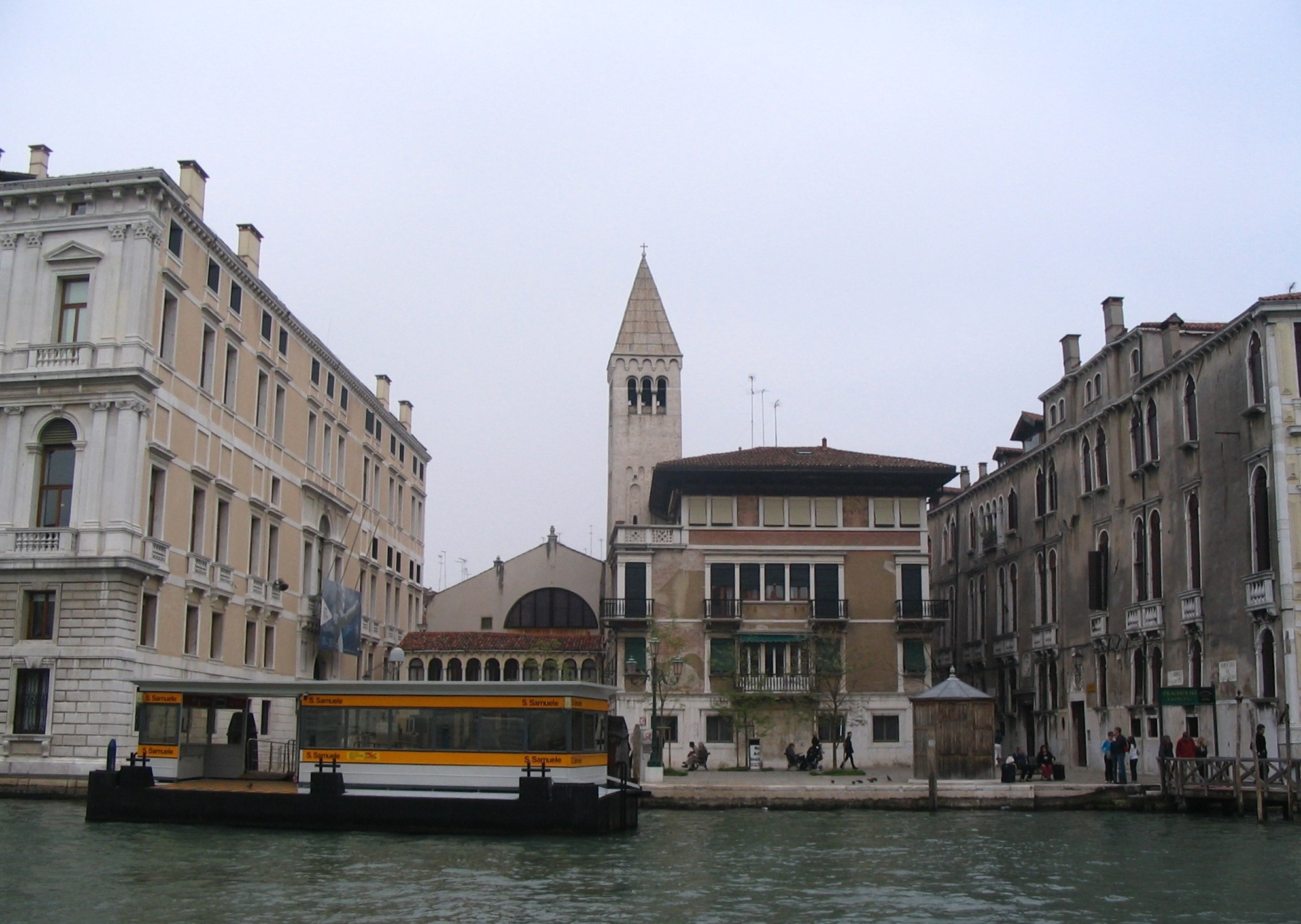 Appontement San Samuele - Grand canal - Venise - Italie